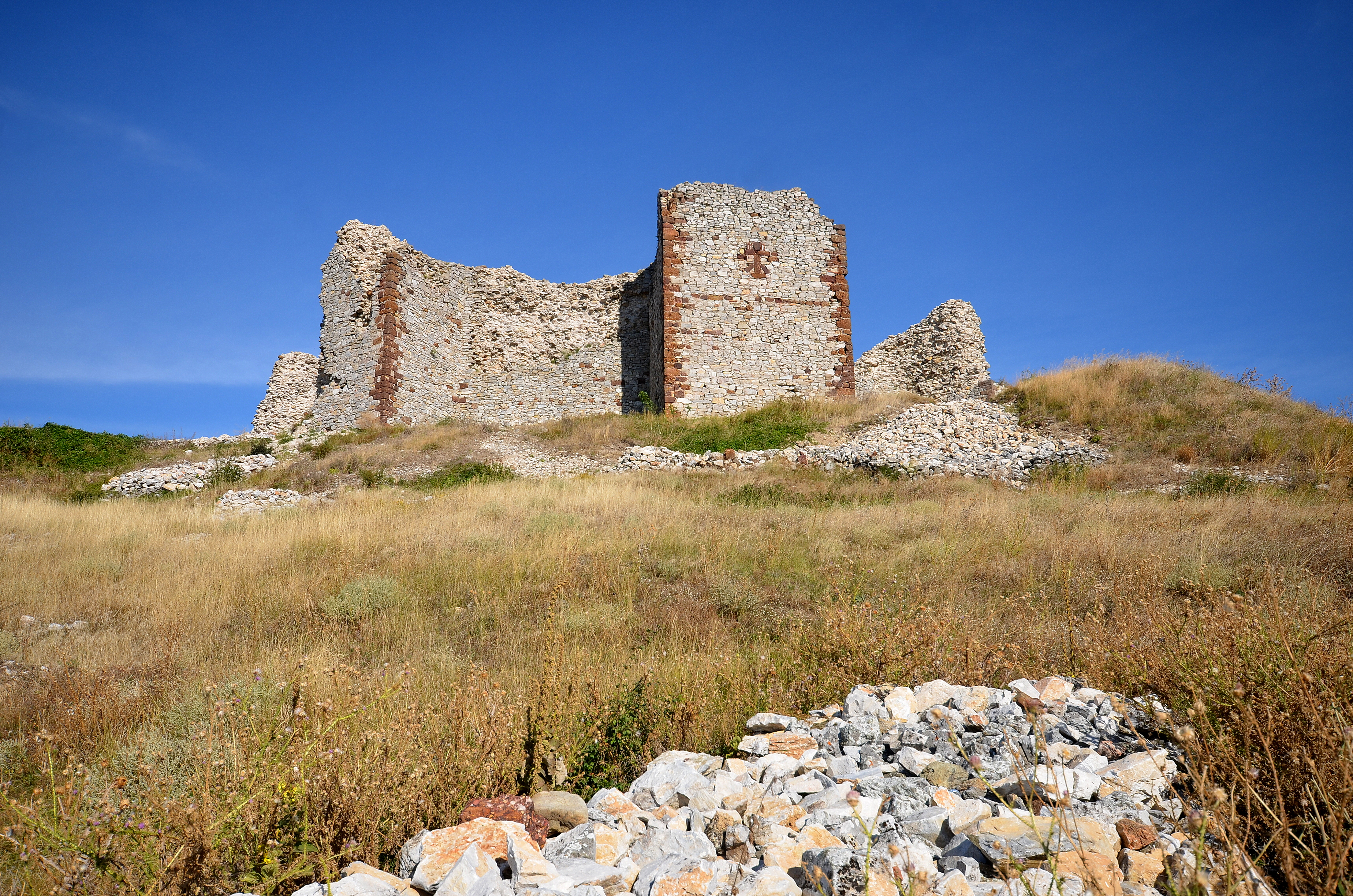 Kalaja e Novobërdës